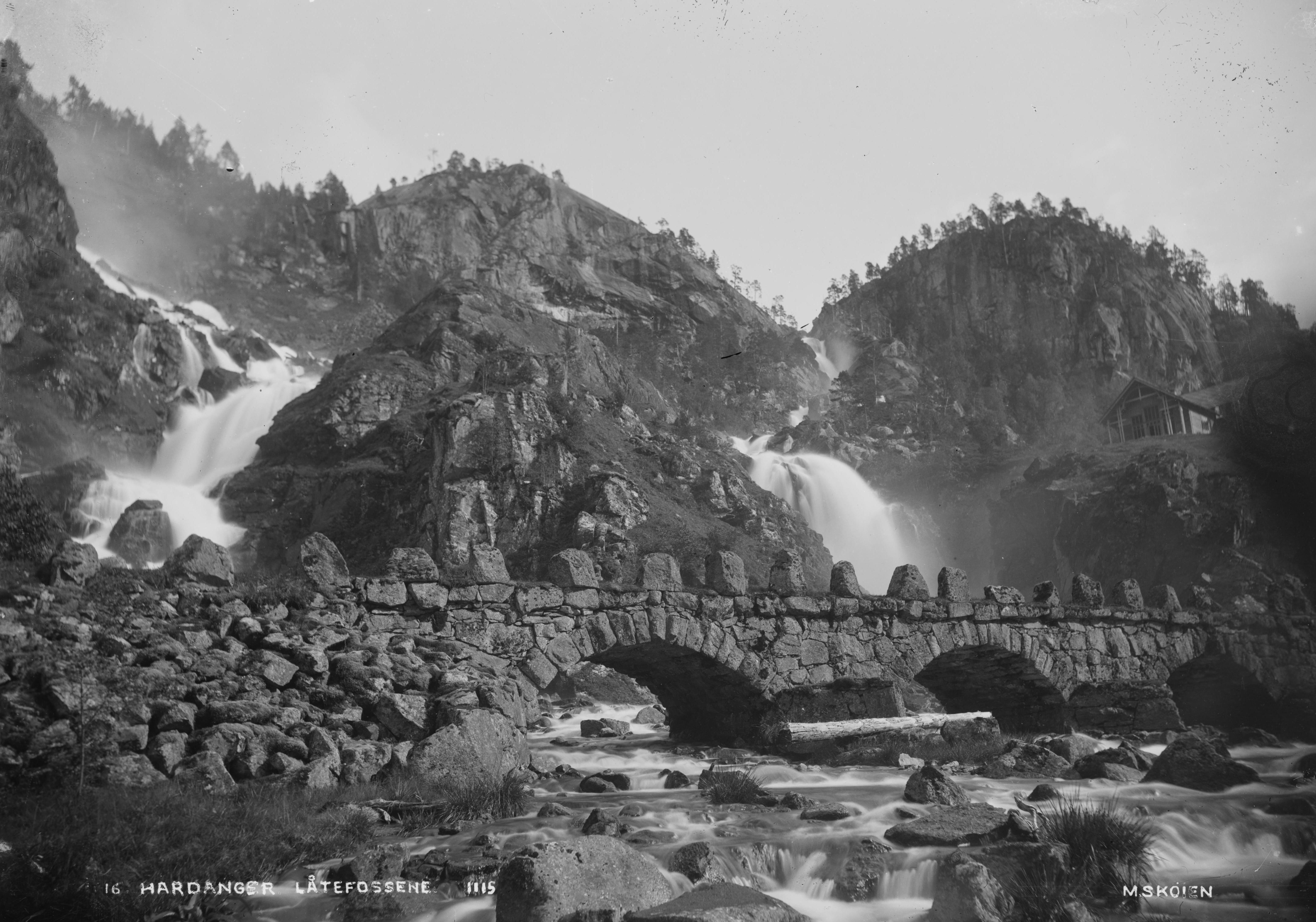 Påskrift negativ: 16 Hardanger Låtefossene 1115 M.Skøien Påskrift konvolutt: B276 Odda Låtefossen med broen og hotellet T.H. [Riksantikvaren] Sted: Låtefossen,Hardanger Kommune: Odda Fylke: Hordaland Tagger: landskap foss steinbro